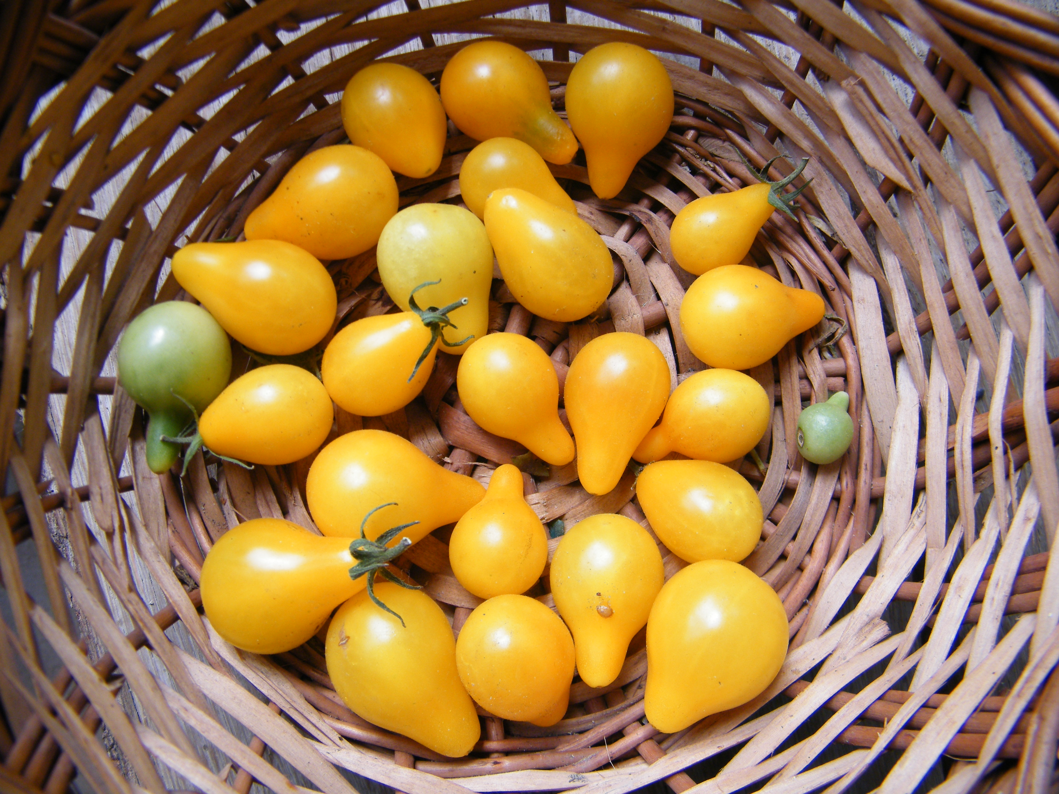 pomidory koktajlowe "Yellow Pearshaped" z uprawy pani Barbary Przybysz (Dachowa)